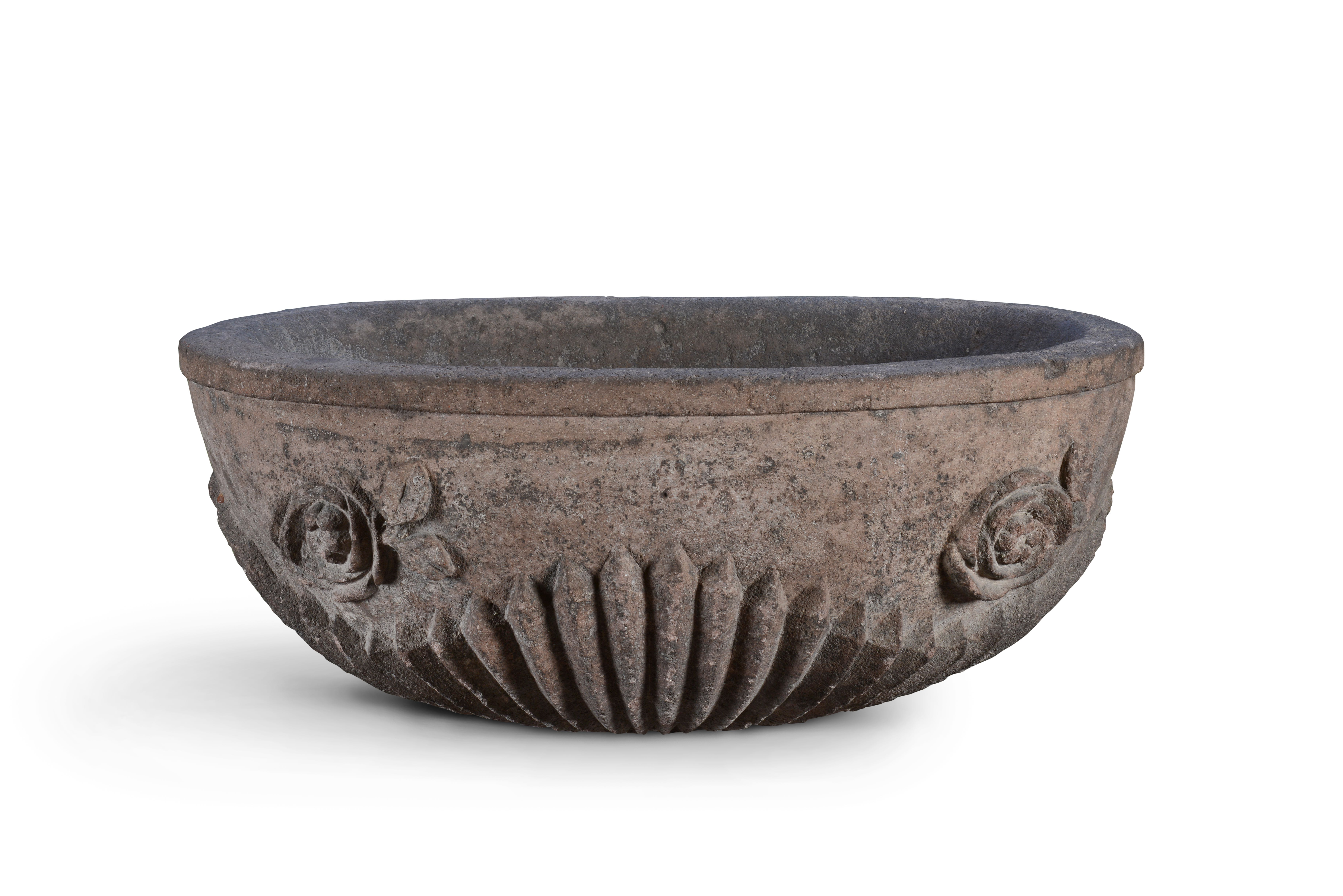 Pila de Bautismo del Antiguo Convento de San Agustín en San Luis Potosí.